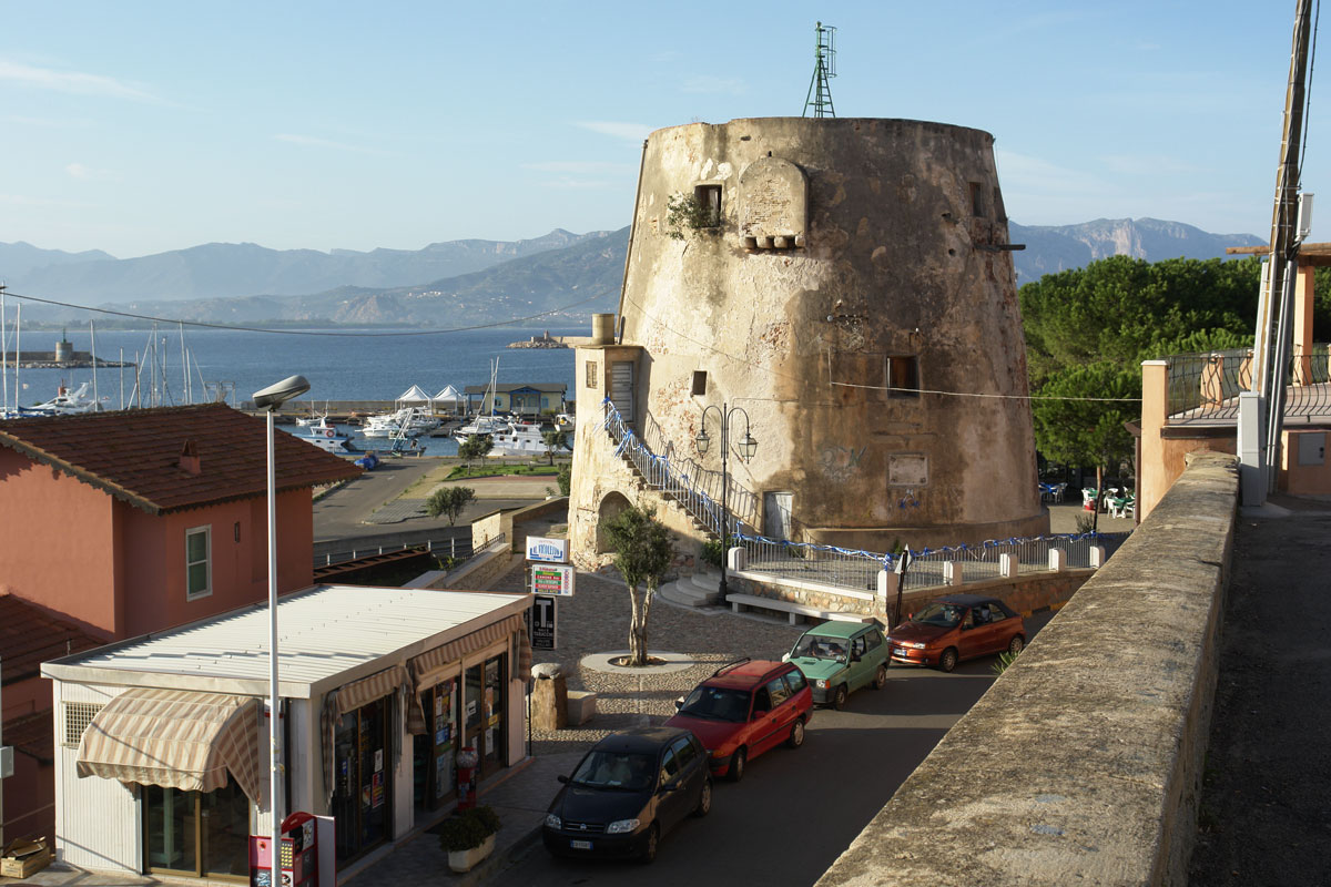 Torre di Arbatax (Spanischer Turm); Arbatax, Ostküste Sardinien